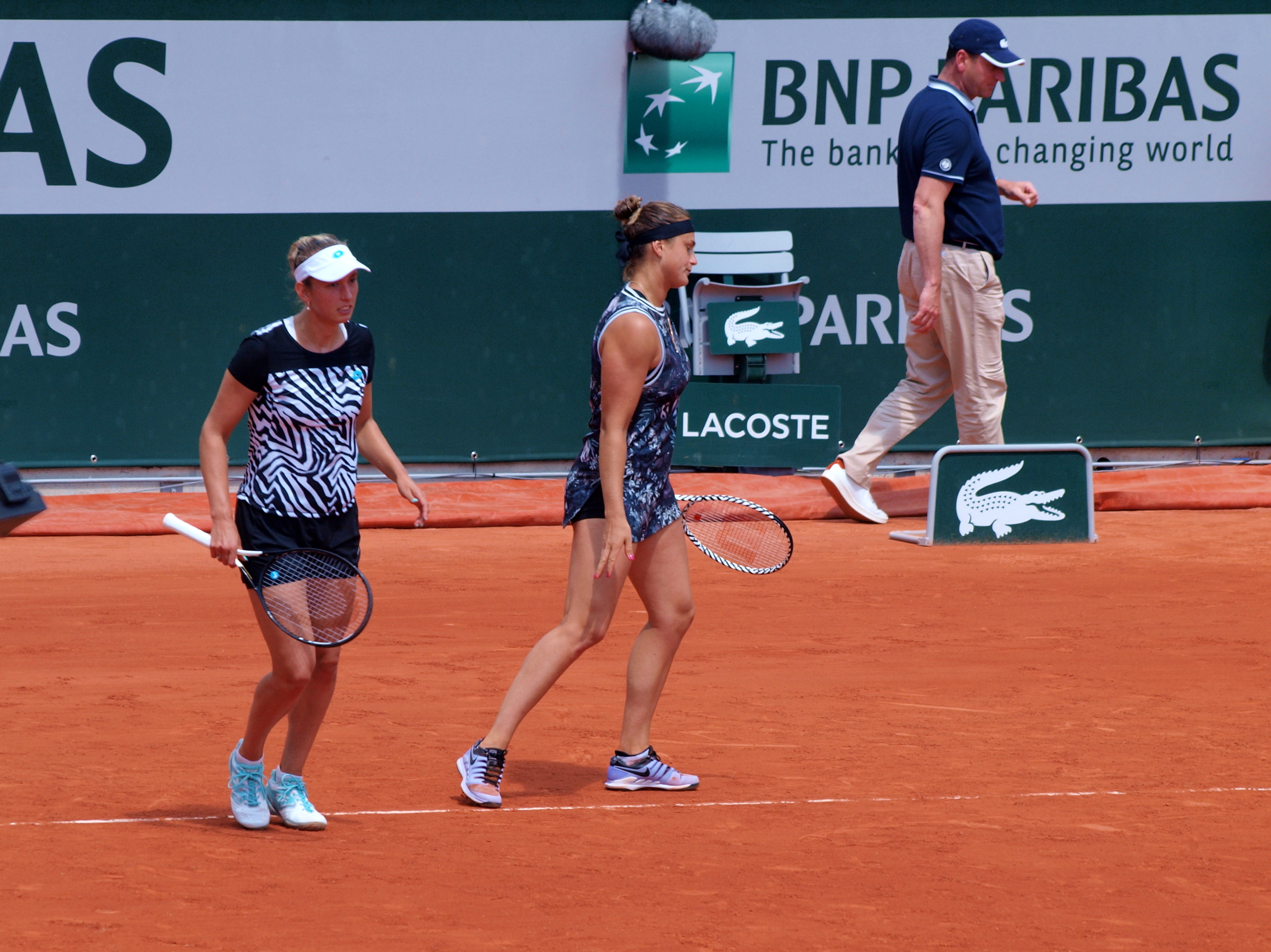 Internationnaux de France de Tennis 2019, au stade Roland Garros de Paris (France), sur le nouveau court Simonne-Mathieu : Double dames entre E. Mertens & A. Sabalenka d'une part et L. Kichenok & J. Ostapenko d'autre part, le jeudi 6 juin 2019